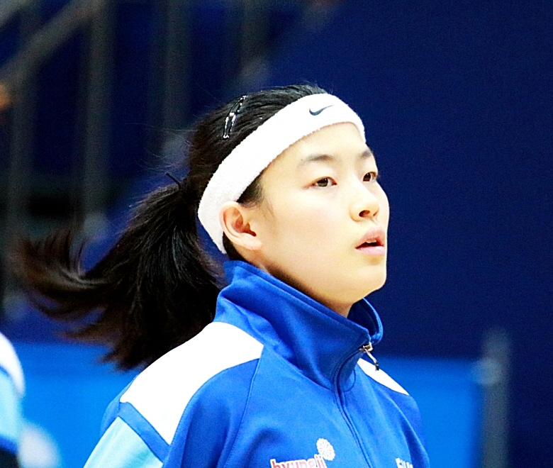 160110 여자농구 신한은행 vs 삼성생명 직찍 1